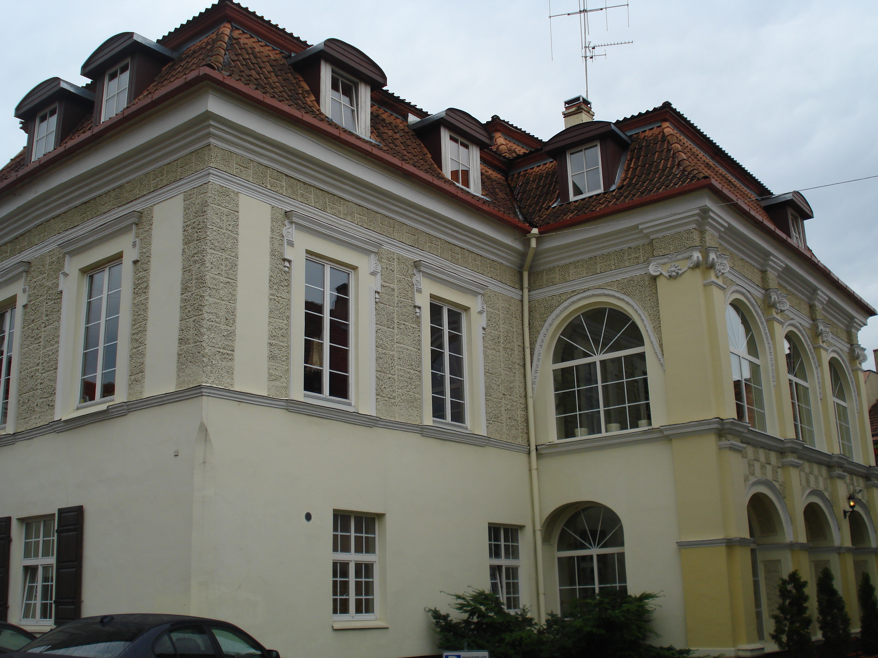 Olizary Palace in Vilnius